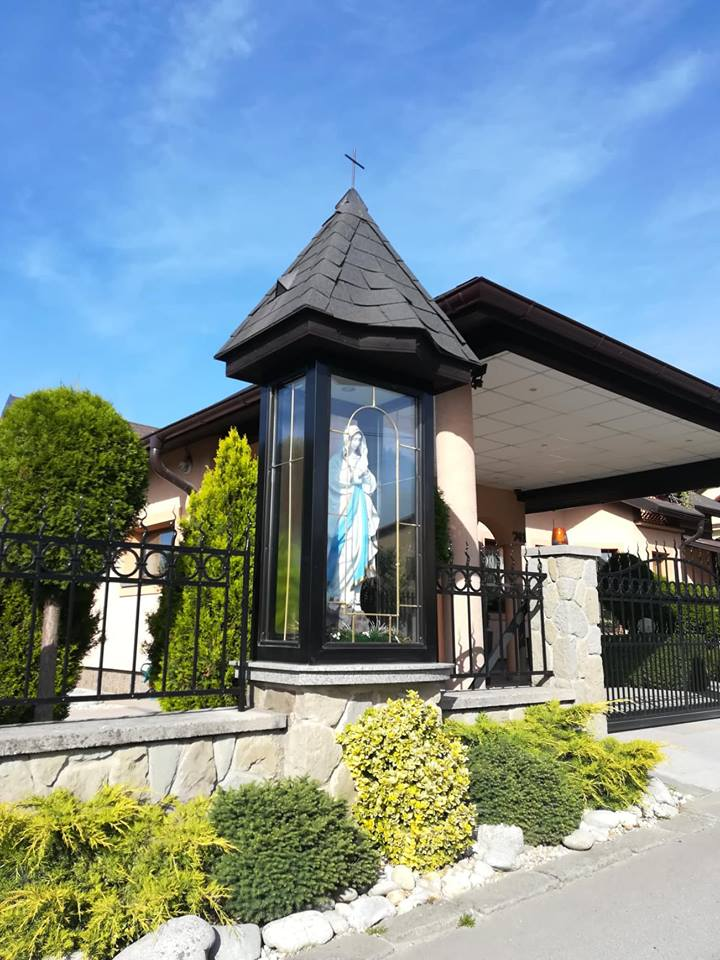 Kaplnka v obci Višňové na ul.Podvŕšie